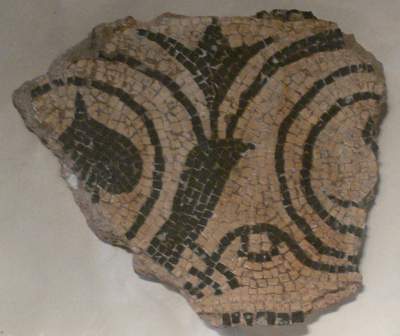 Fragment de mosaïque. Découverte ancienne à Rigny, en Haute-Saône. Vesoul, musée Georges-Garret.